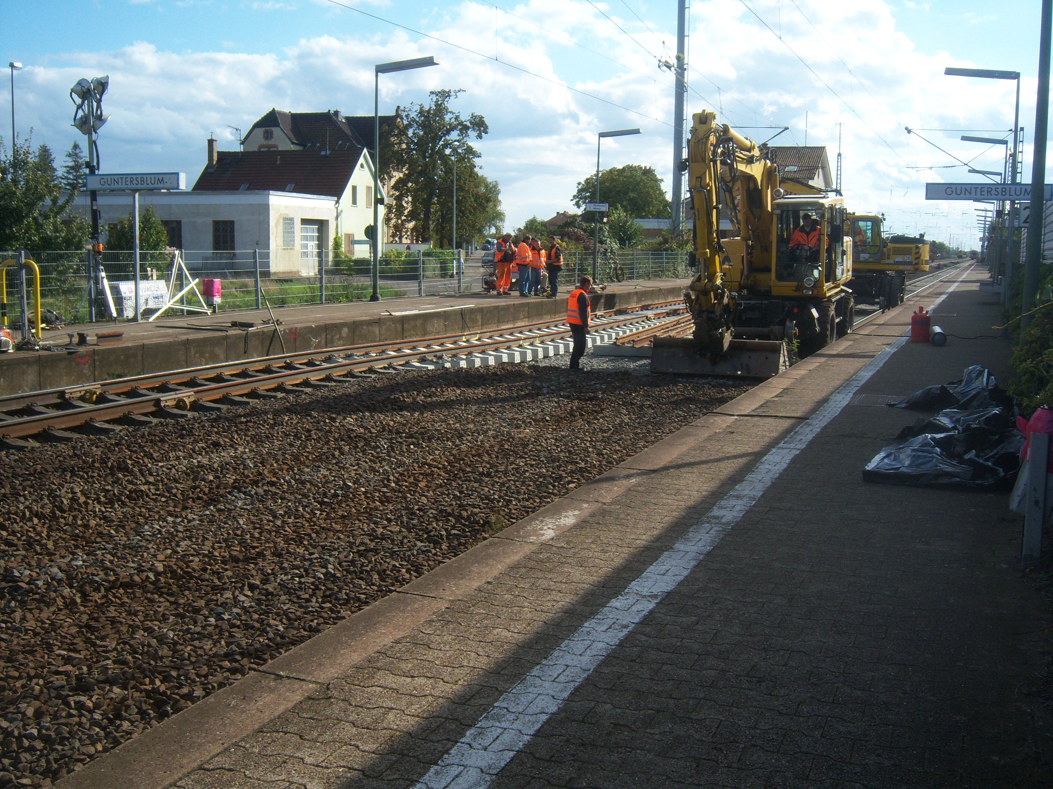 Sanierung eines Gleisbetts eines Oberbaus im Bahnhof Guntersblum auf der Bahnstrecke Mainz–Ludwigshafen